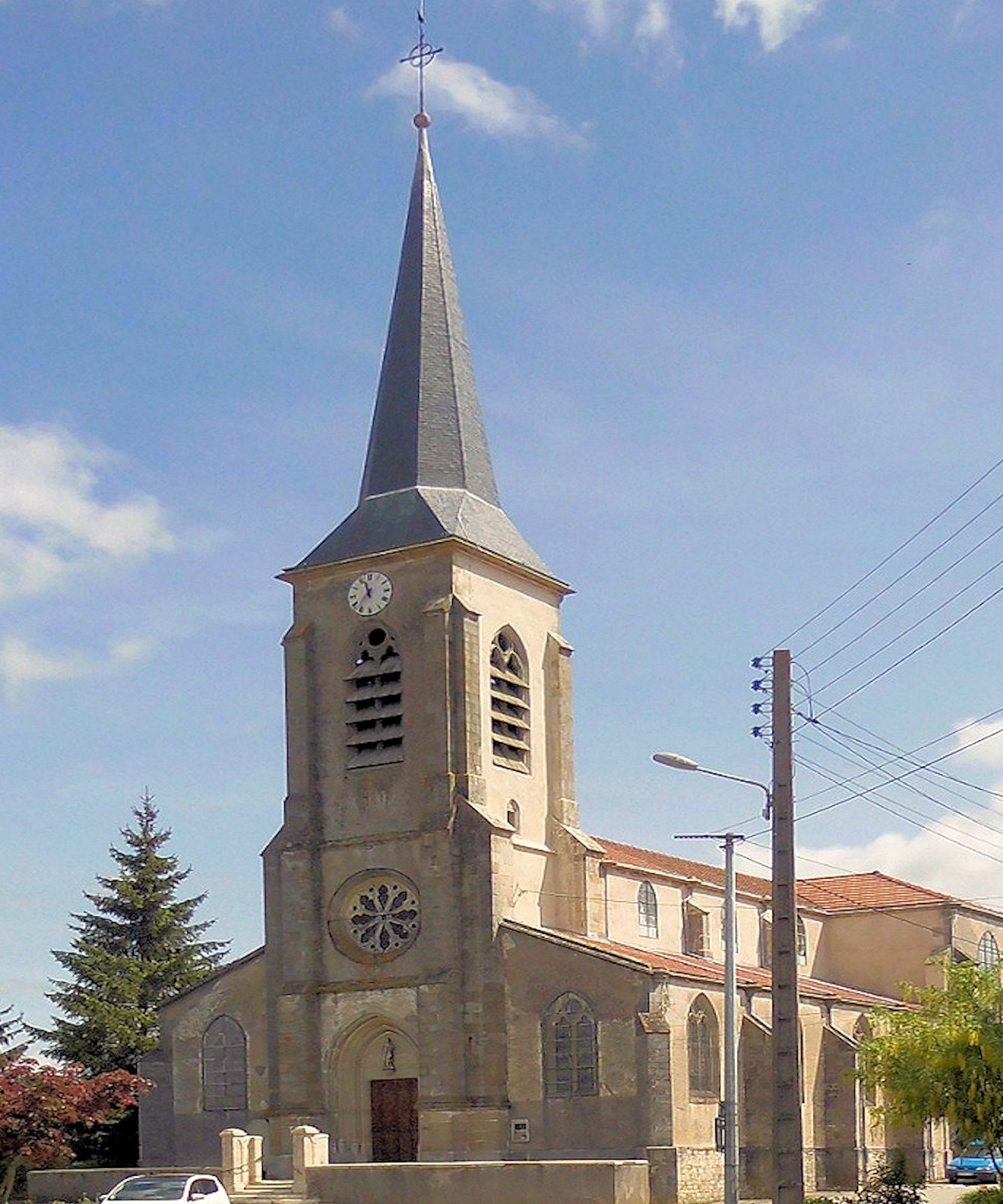 L'église Saint-Firmin de Saint-Firmin